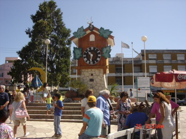 El reloj cucú de Villa Carlos Paz - Villa Carlos Paz's cucú clock